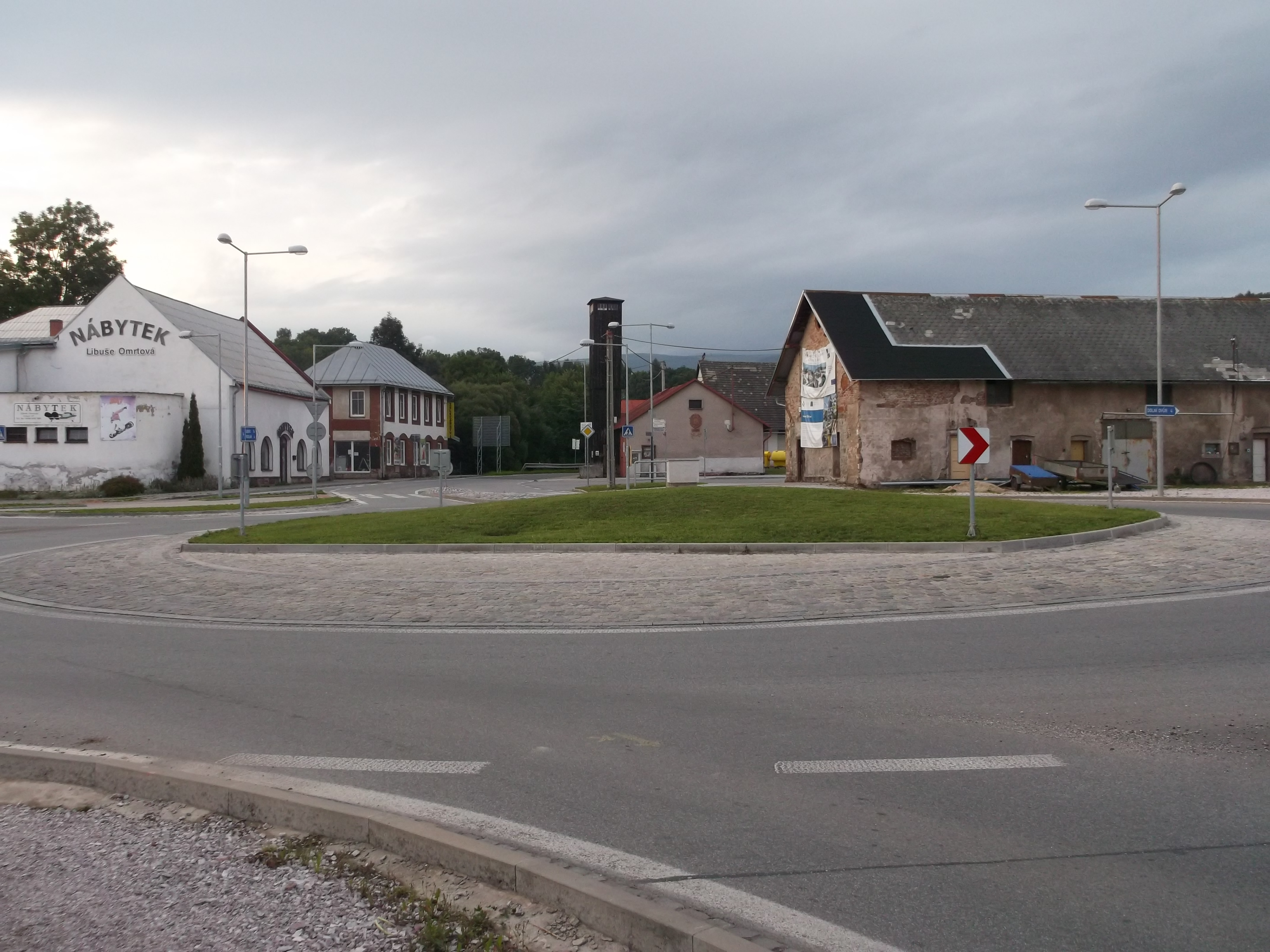 Prostřední Lánov - kruhový objezd ve středu obce